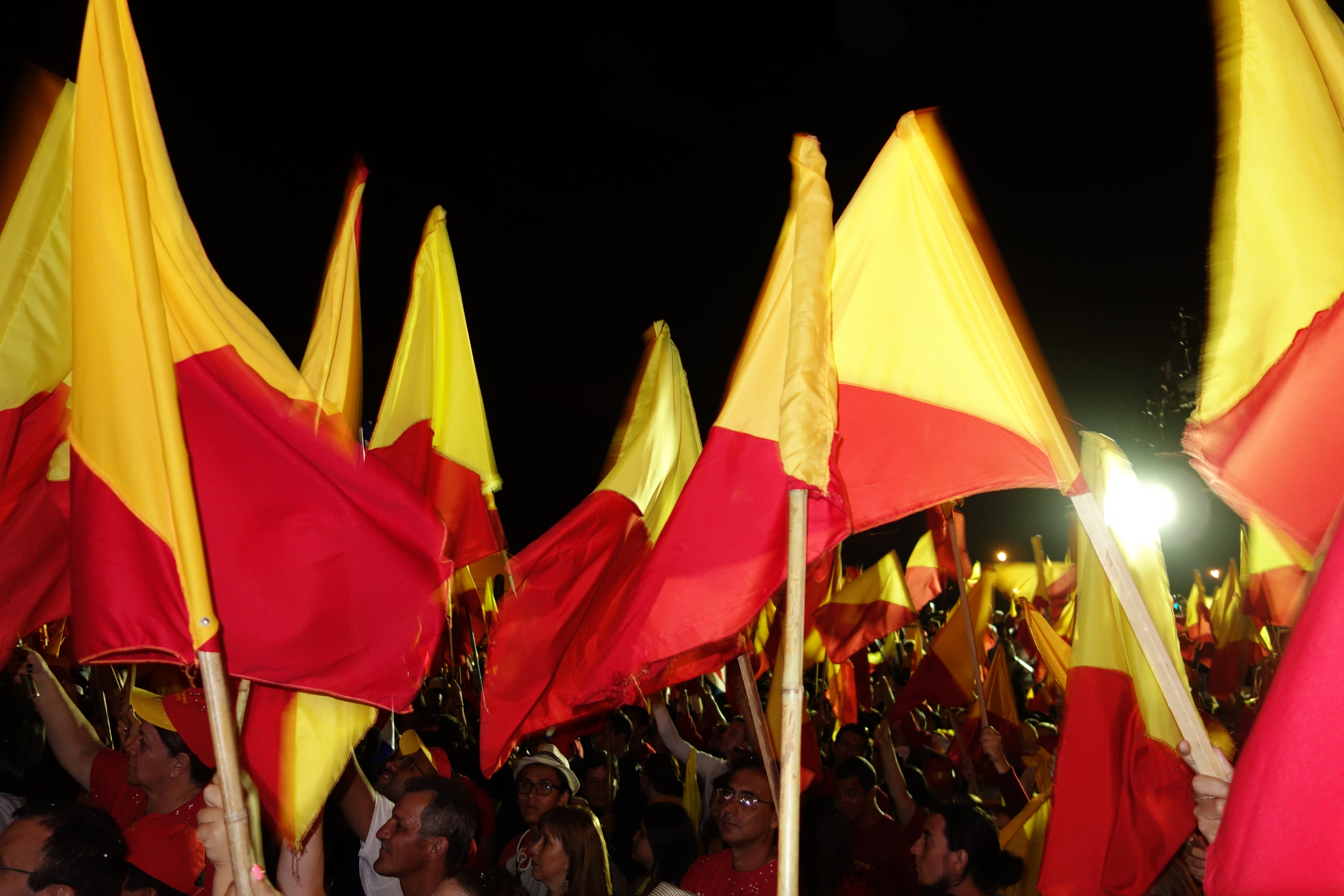 Valgvaka til Partido Acción Ciudadana på Plaza Roosevelt i San Pedro under andre runde av presidentvalget i Costa Rica 2014